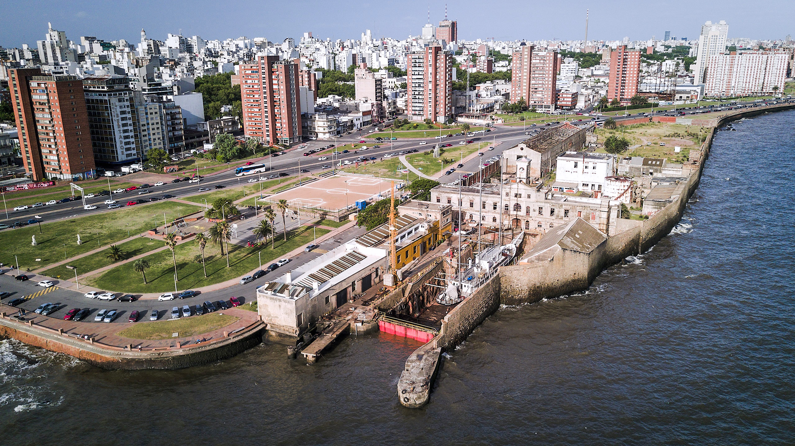 Dique Maua